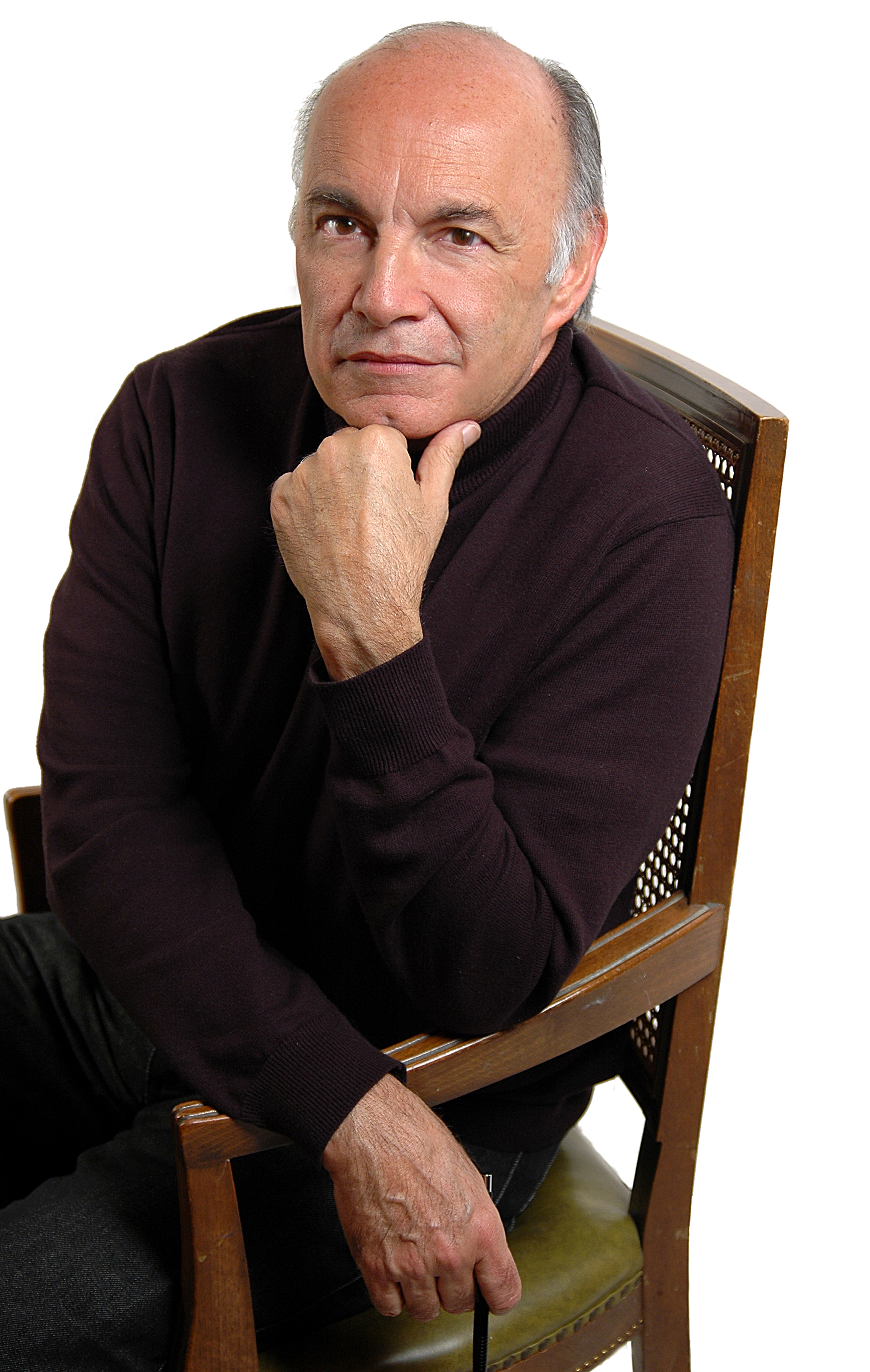 Horacio Altuna